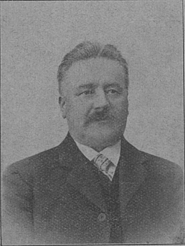 Kauppaneuvos Juho Hallenberg